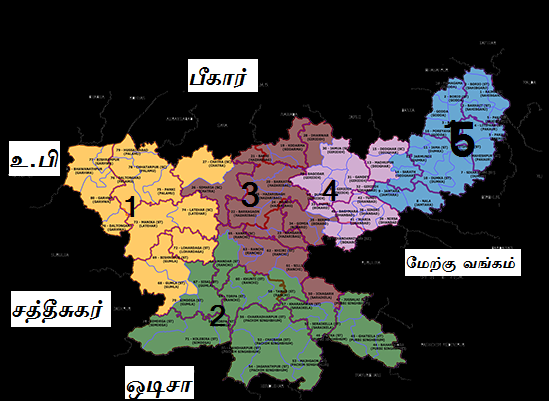 இந்தியத் தேர்தல் ஆணைய வரைபடத்தை கொண்டு உருவாக்கப்பட்டது.